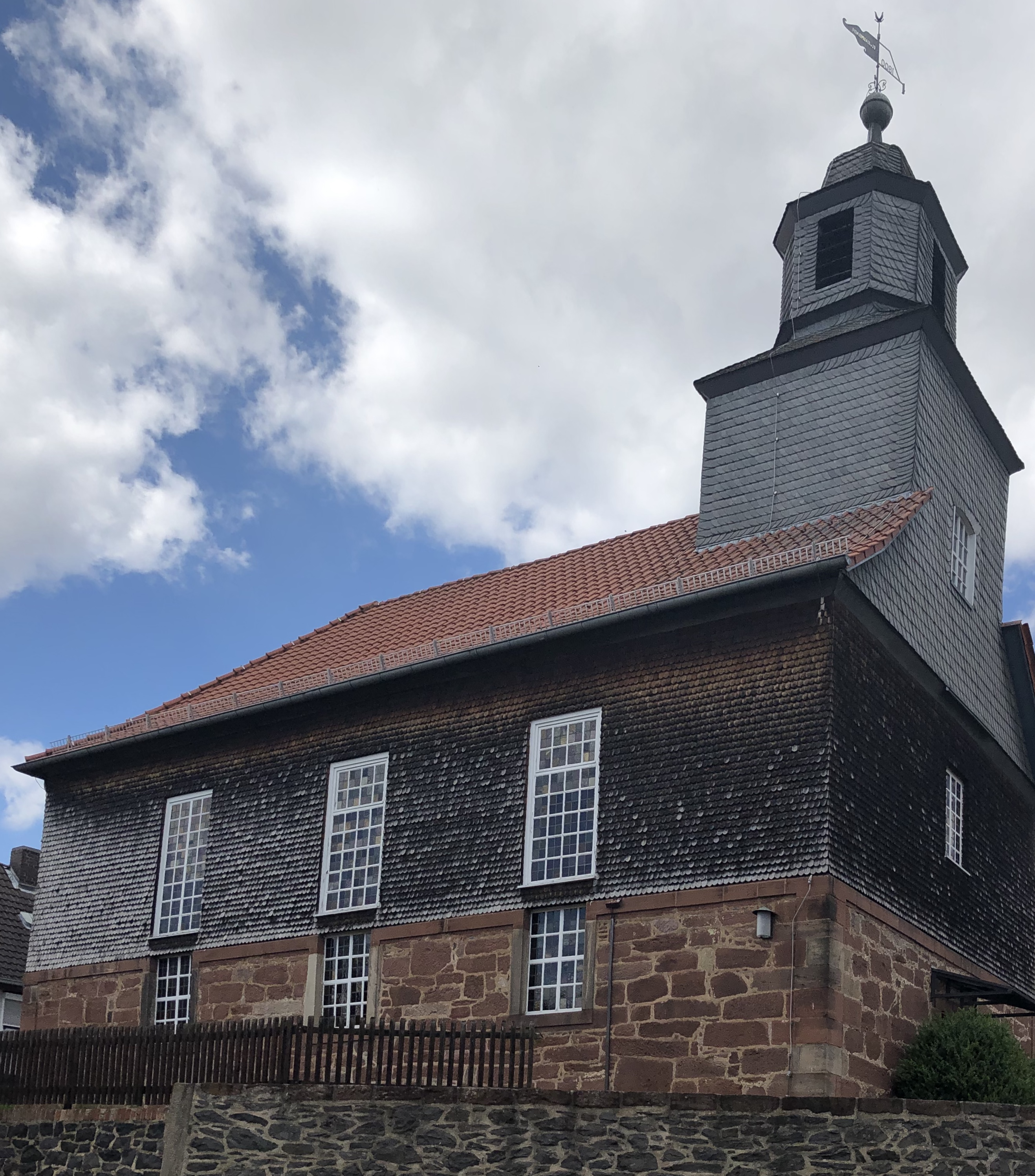 Kirchengebäude